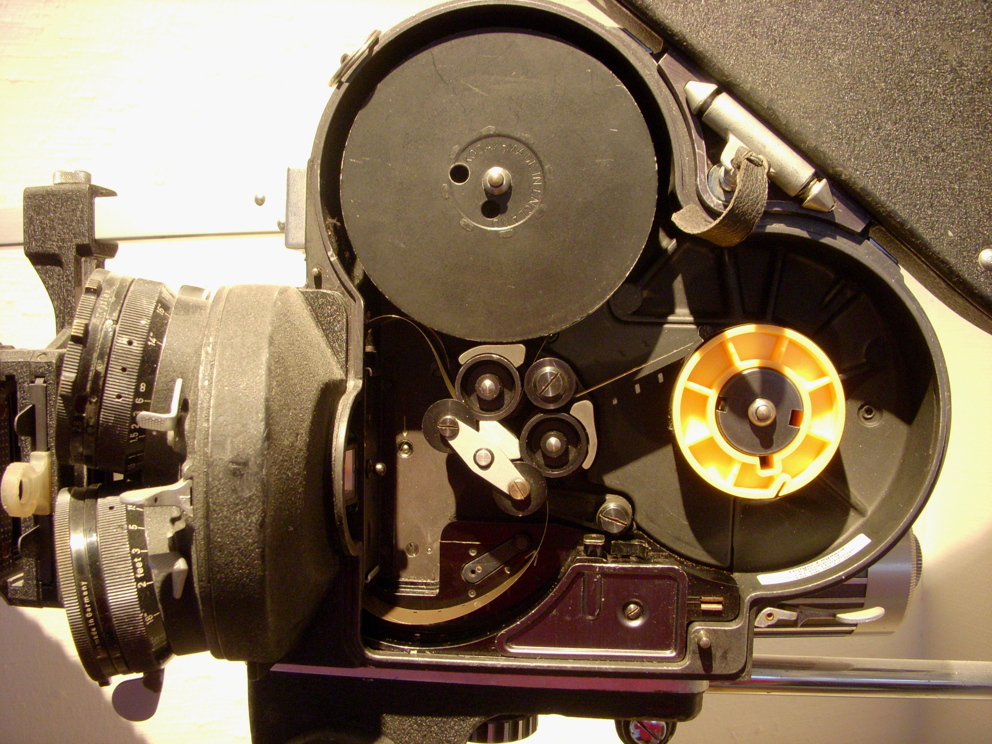 Filmföringen i en 16mm Arriflex-kamera